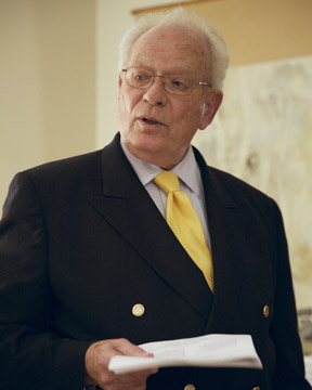 Richard Westenburg